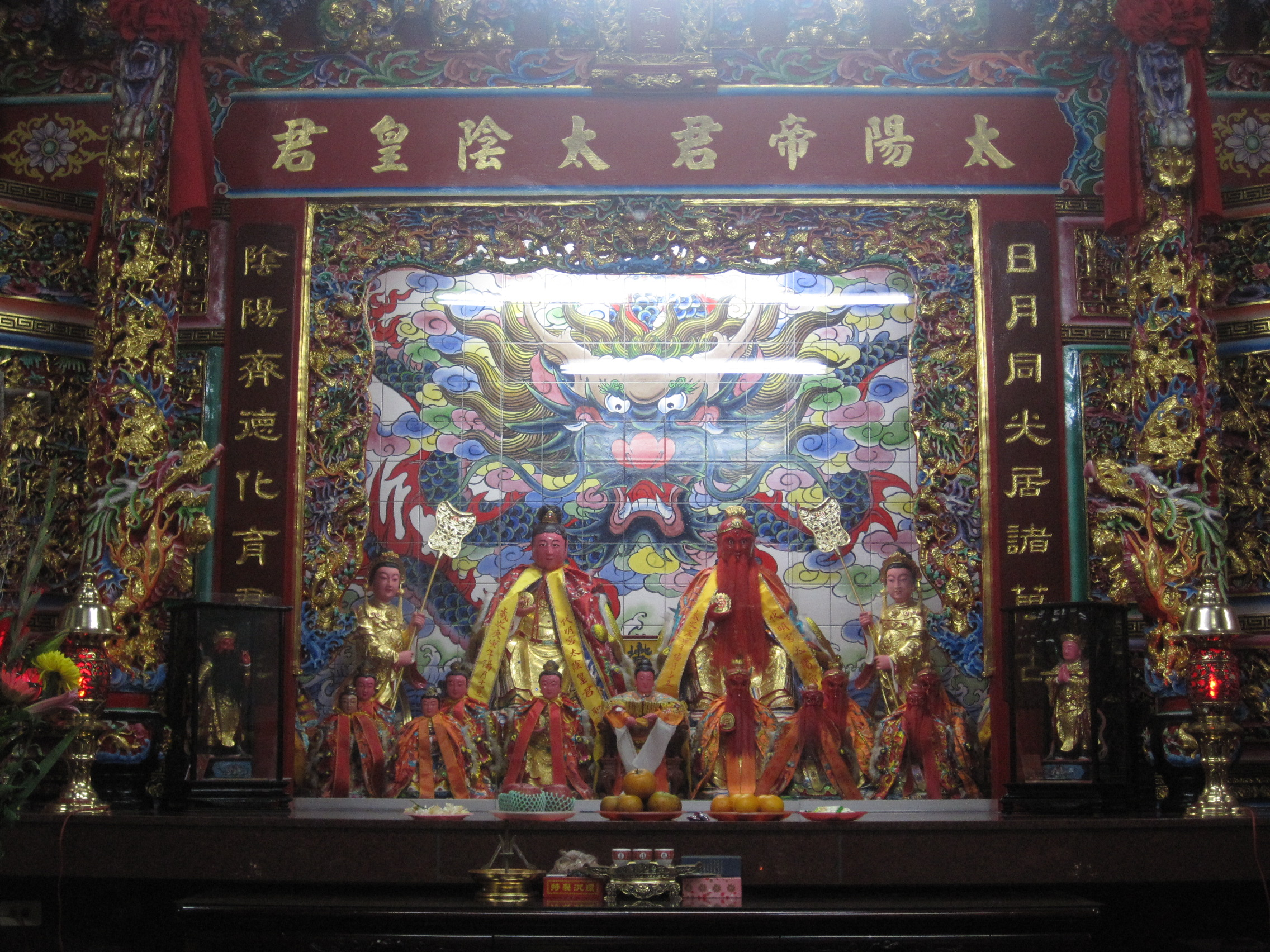 基隆代明宮的神像